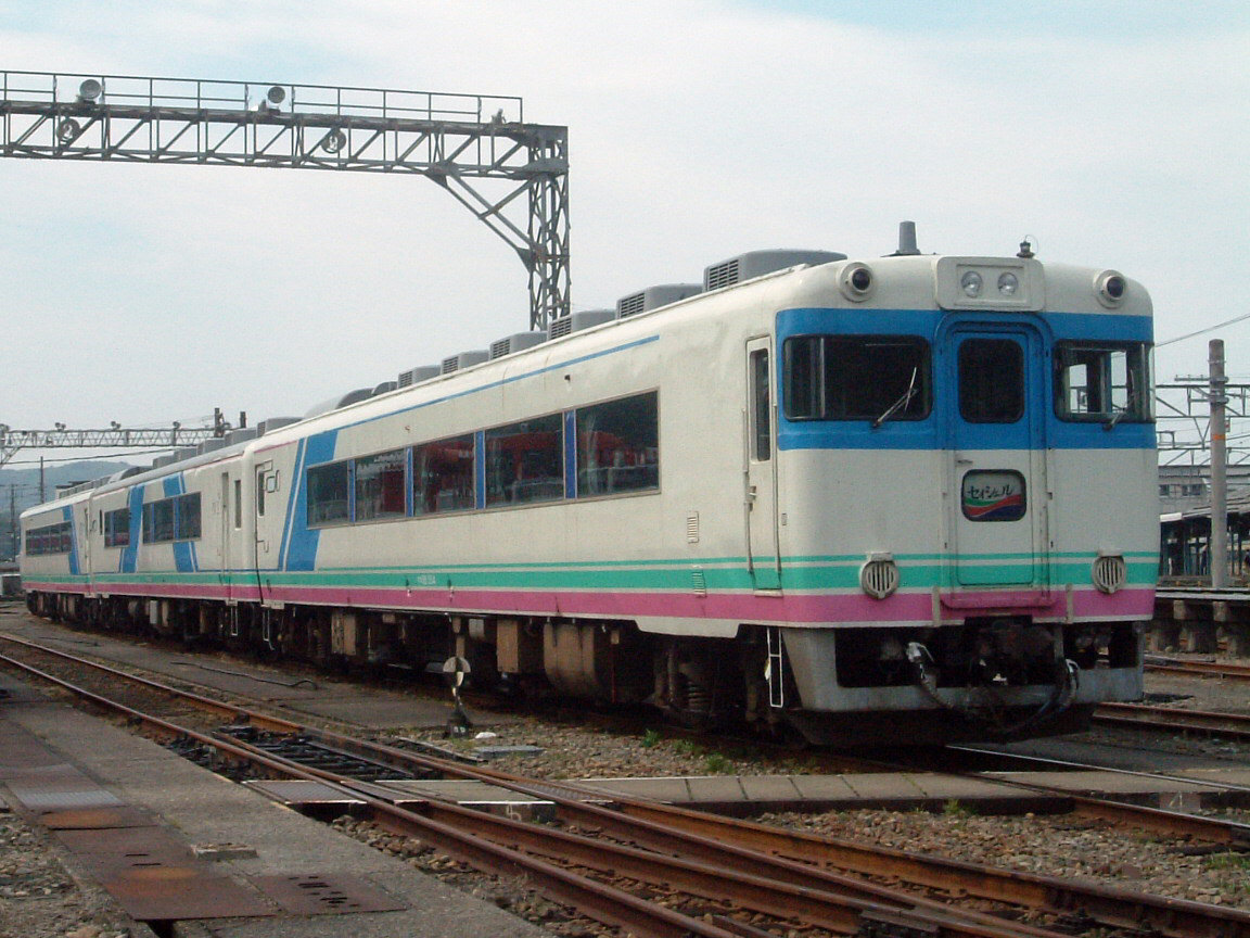 JR西日本「セイシェル」（豊岡駅構内での公開展示時に撮影）